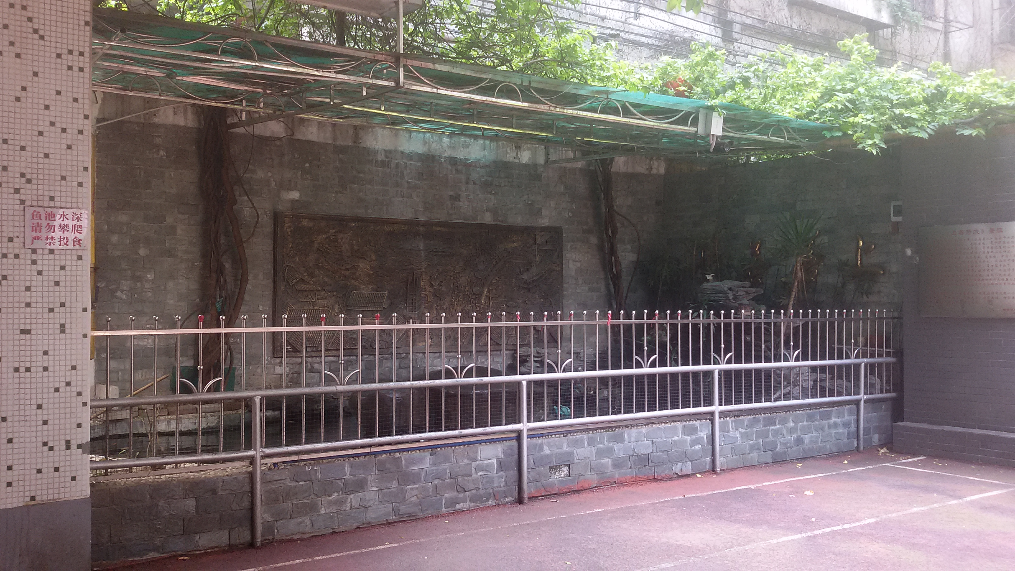 粵語: 喺越秀凈慧體校入面，重可以睇到以前玄妙觀凈低未俾人揼爛嘅石像。一到每年農曆新年時，好多人嚟嗰度拜祭。